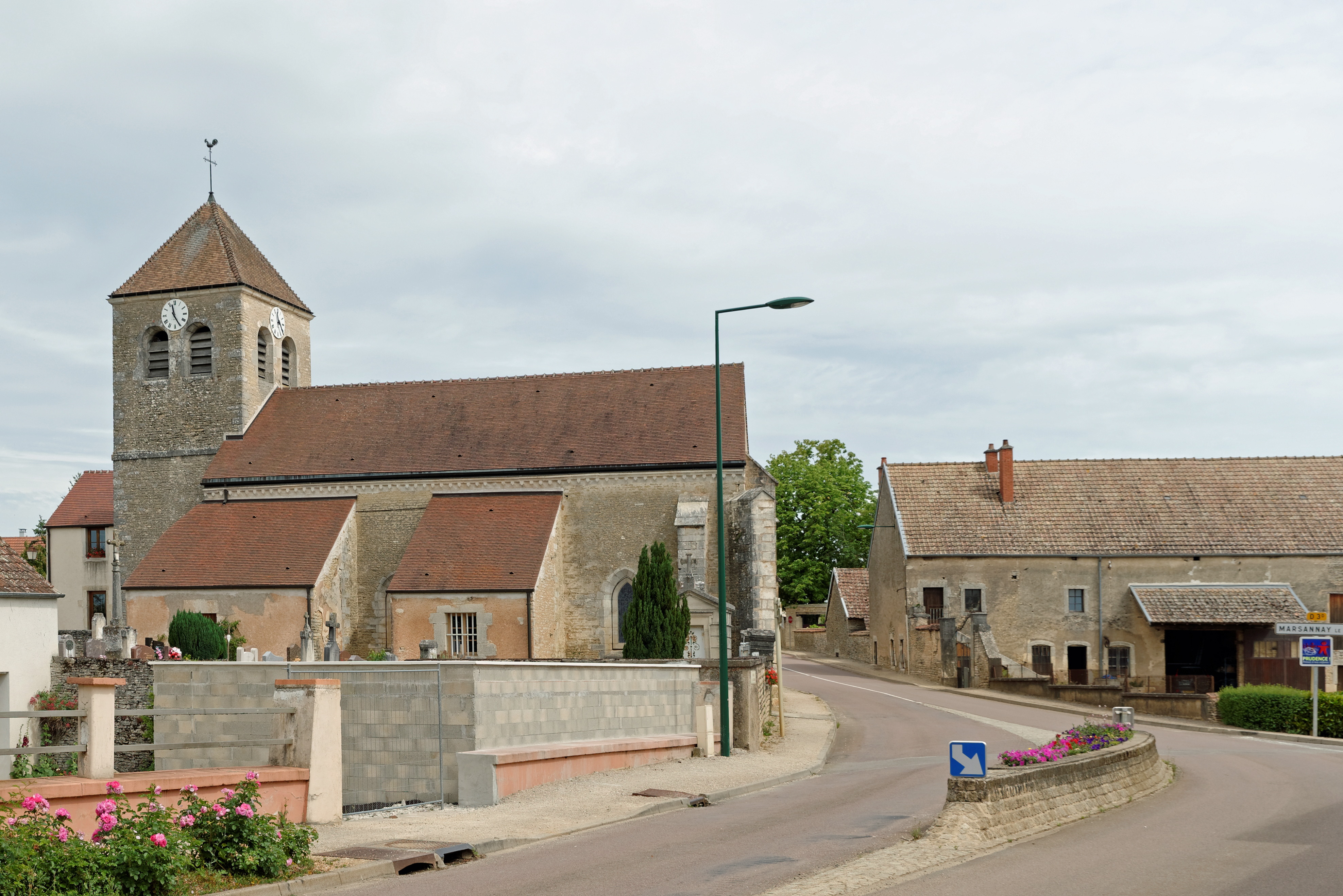 Vue du village d'Épagny (Côte-d'Or, Bourgogne, France)